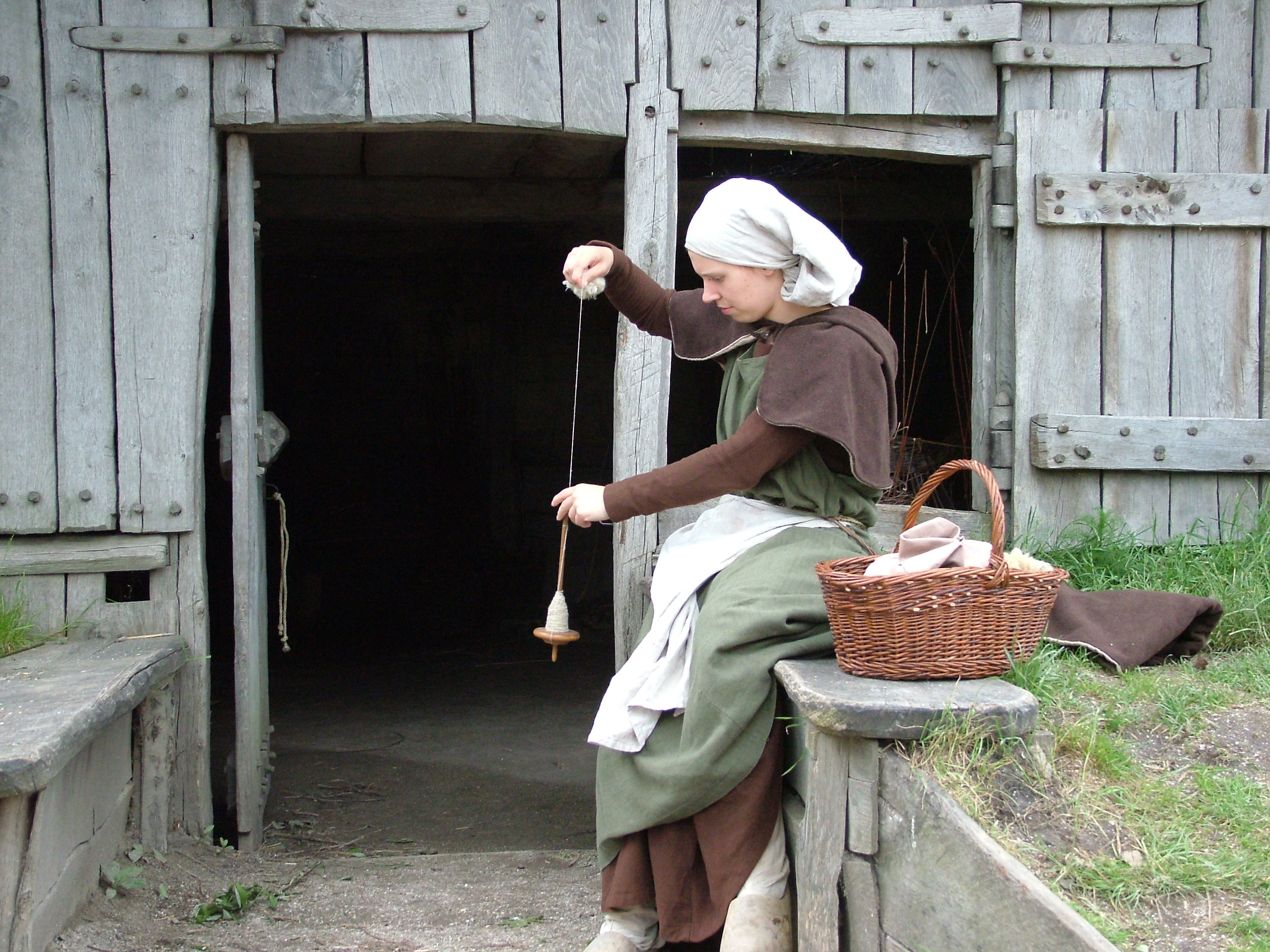 Spinnerin mit Spindel, Archeon